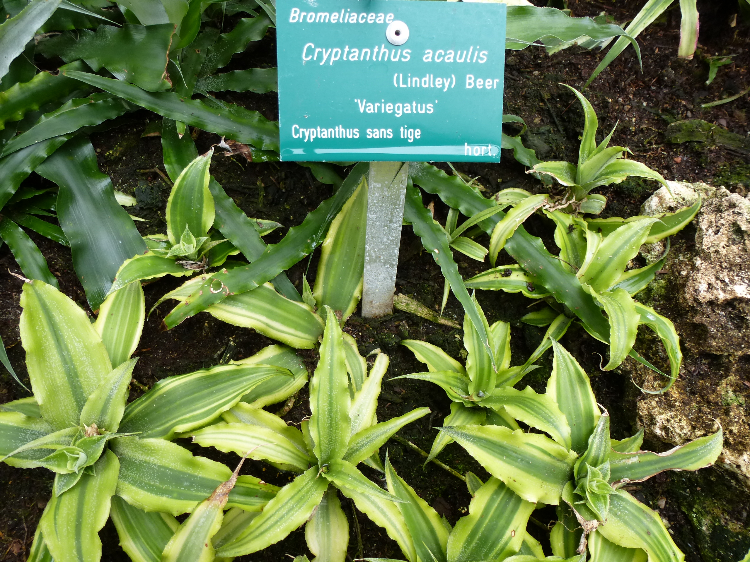 Cryptanthus acaulis var. variegatus - Serres d'Auteuil - Jardin botanique de la Ville de Paris - France